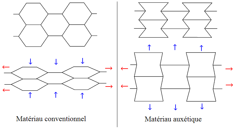 Destiné à illustrer l'article "auxétique" (Negative Poisson's Ratio material), création de Blinking Spirit